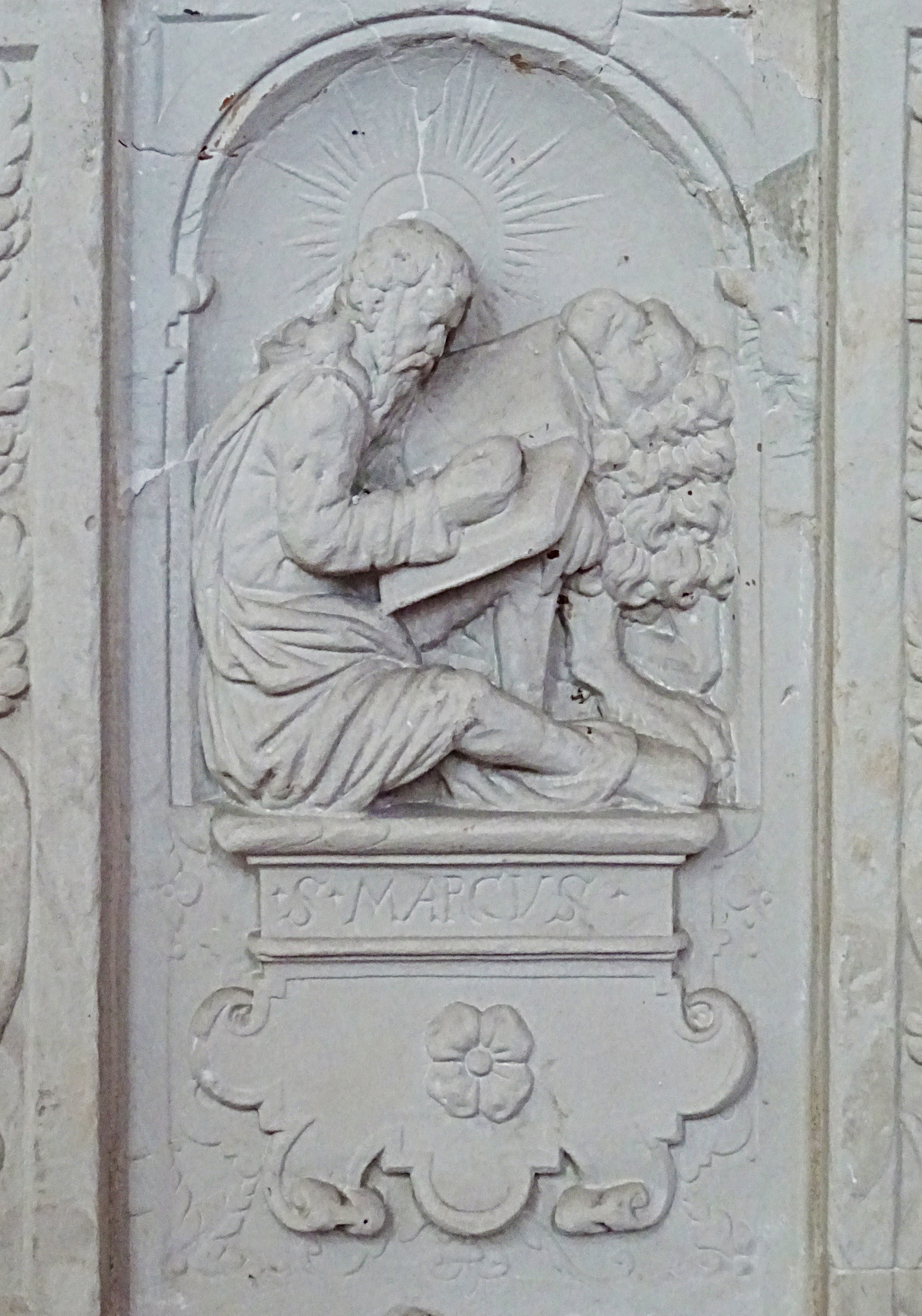 Steinbilderbibel in der St. Annenkirche (Eisleben), 27/29, Evangelist Markus